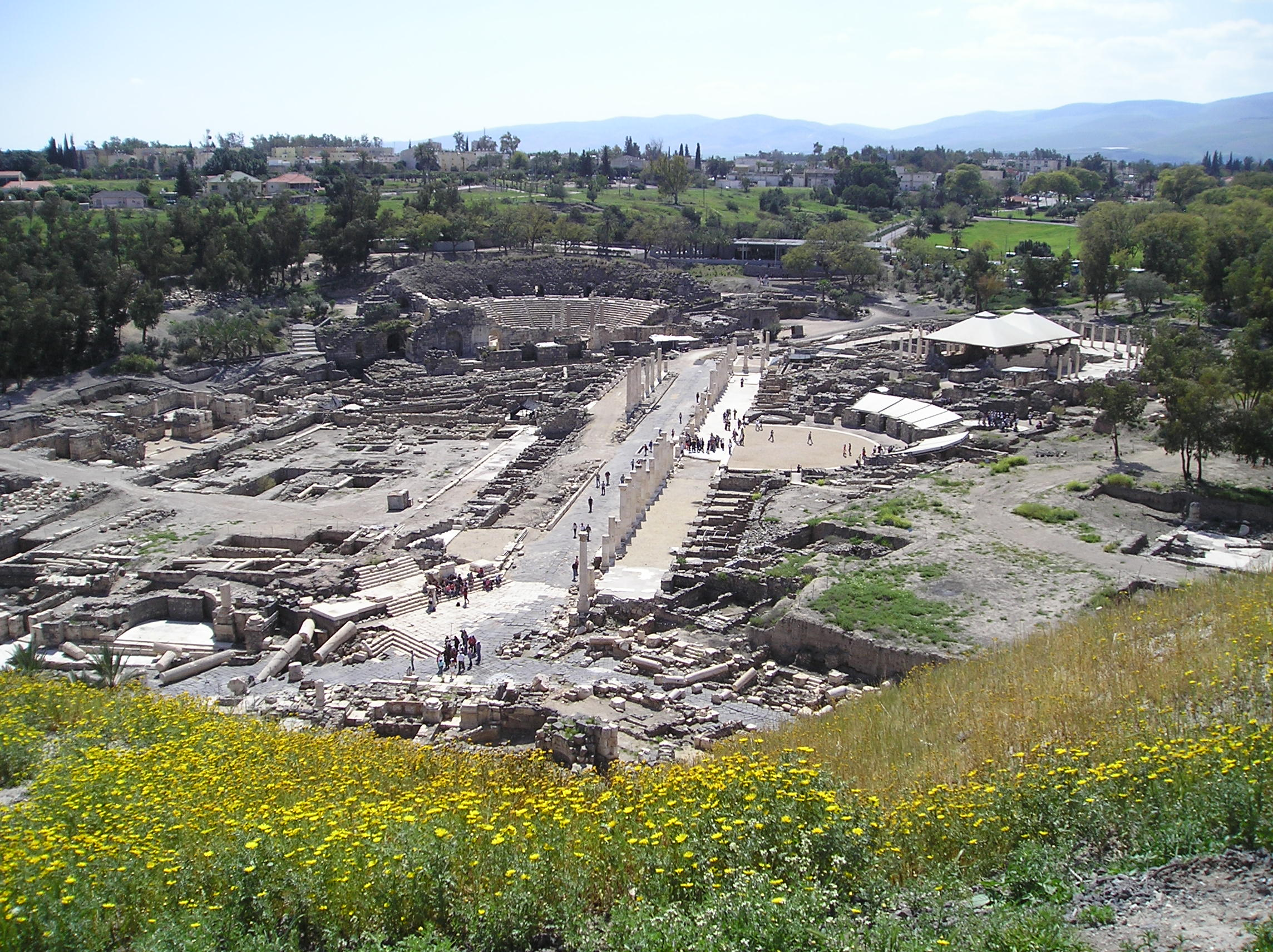 Bet Szean (stanowisko archeologiczne - Scytopolis) w Izraelu. Widok z Tel Bet Szean na teren parku archeologicznego.